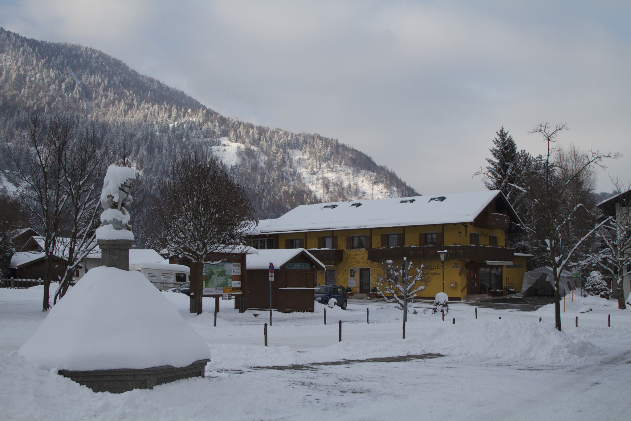 Am Oberauer Dorfplatz, der Winter hat Anfang März nochmal richtig zugeschlagen.